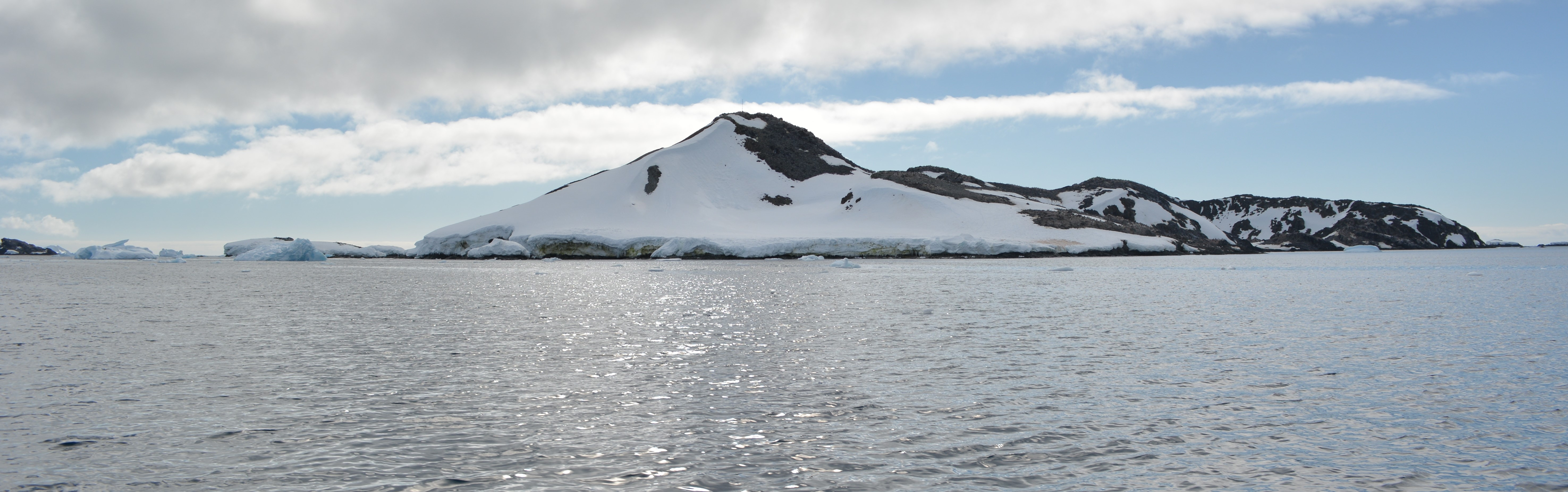 Isla Kopaitic vista actual y lateral desde el costado Este.